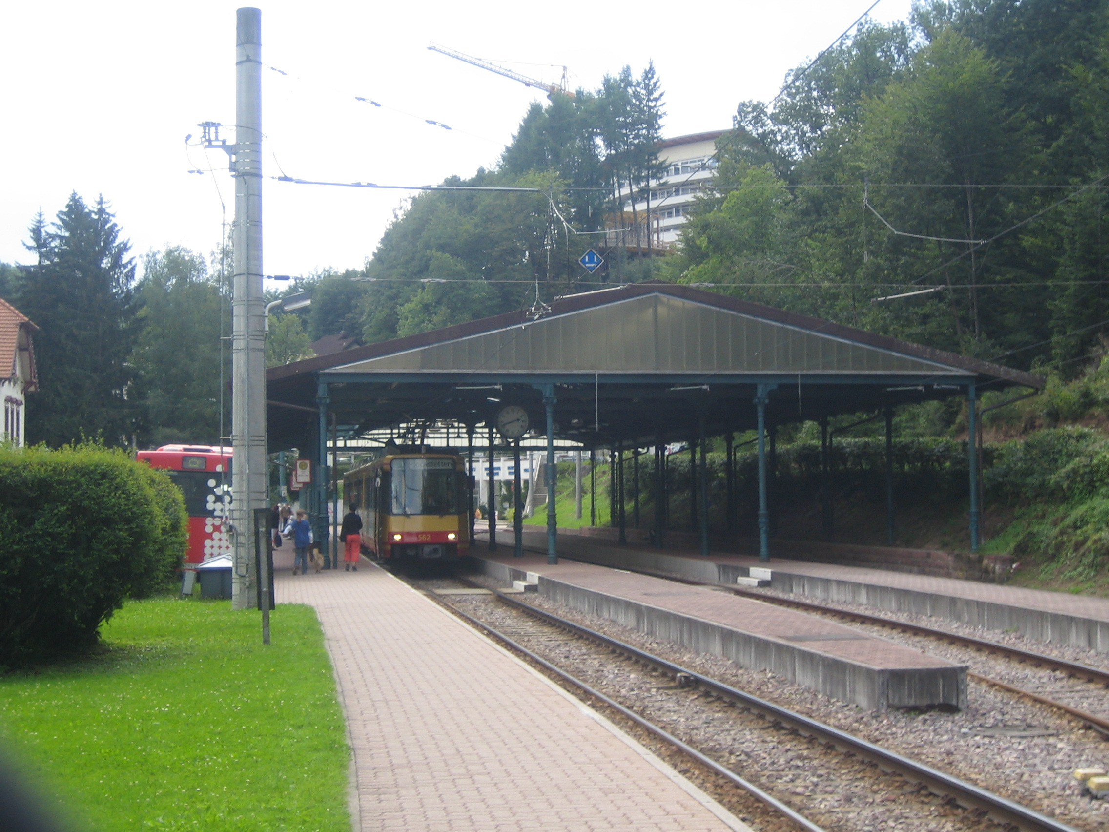 Bahnhof Bad Herrenalb, selbst fotografiert